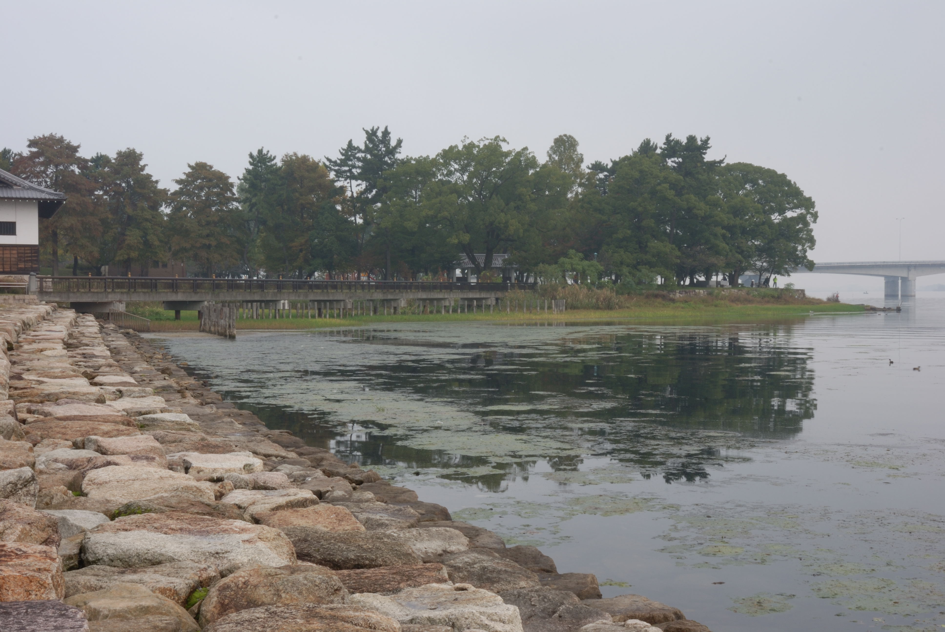 Zeze castle